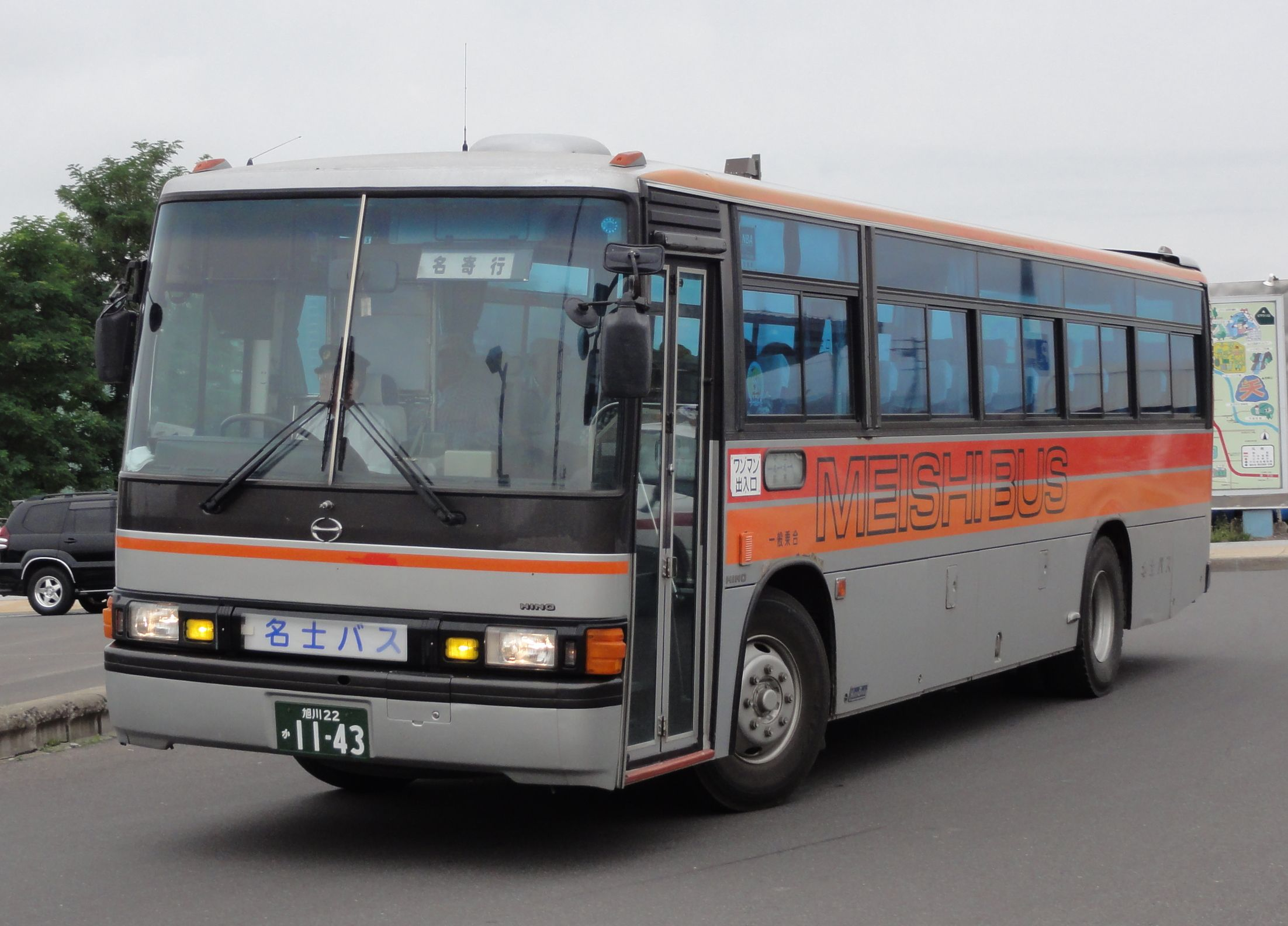 Meishi Bus omnibus car 名士バス 路線バス